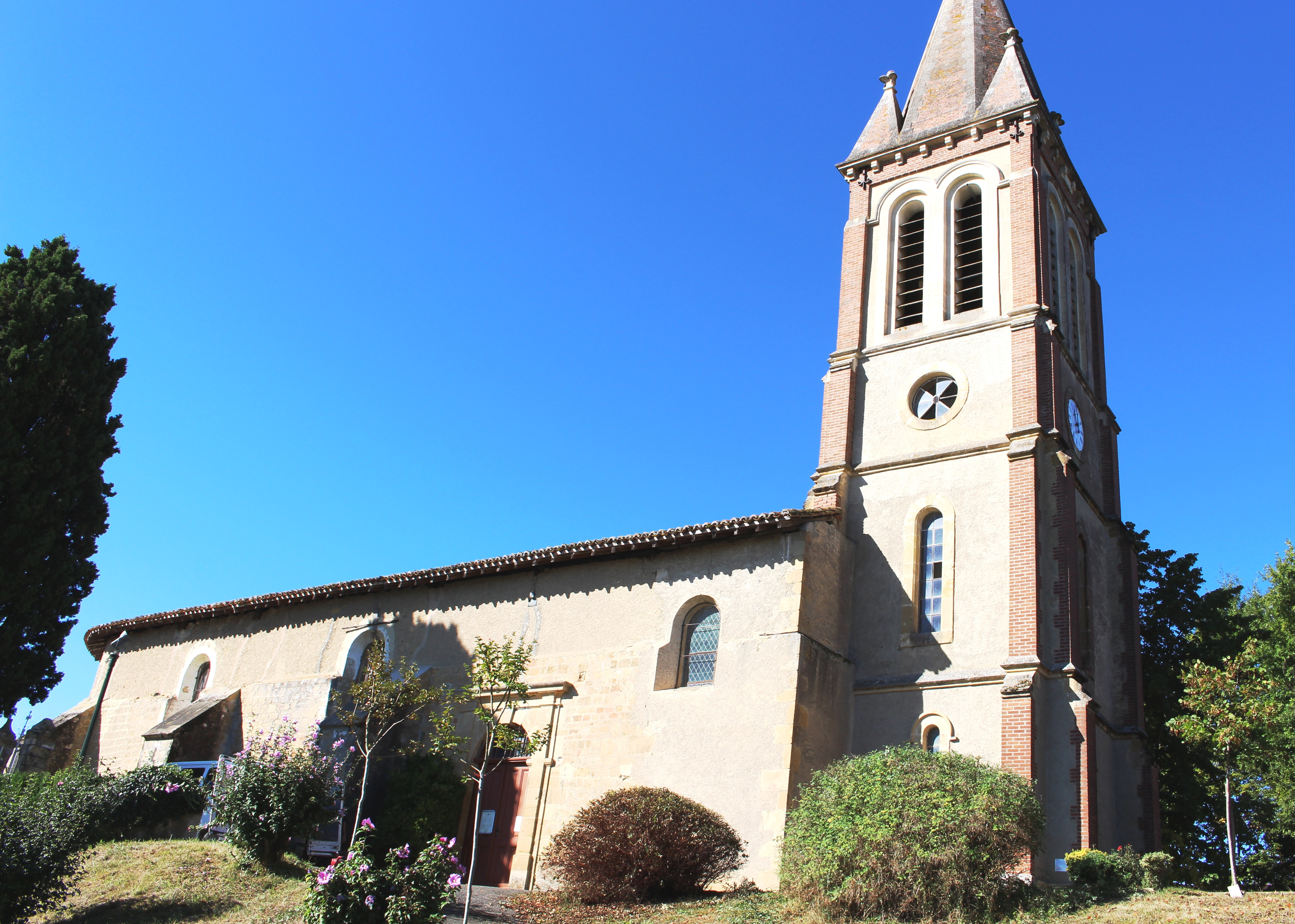 Église Saint-Jacques de Sauveterre (Hautes-Pyrénées)